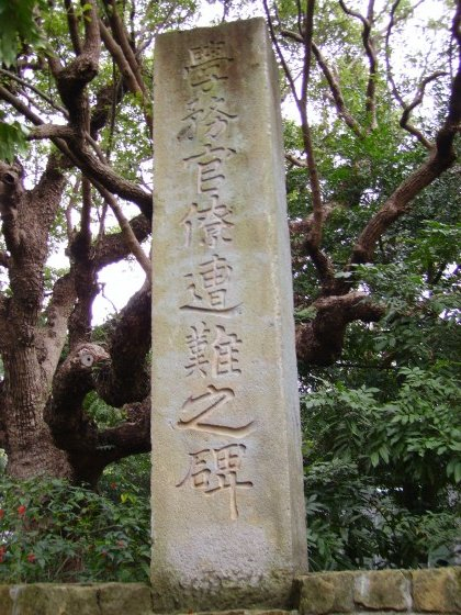 臺北市士林區天母芝山岩附近的學務官僚遭難之碑。